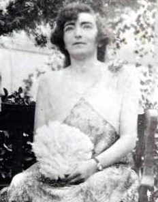 بدرالملوک والا